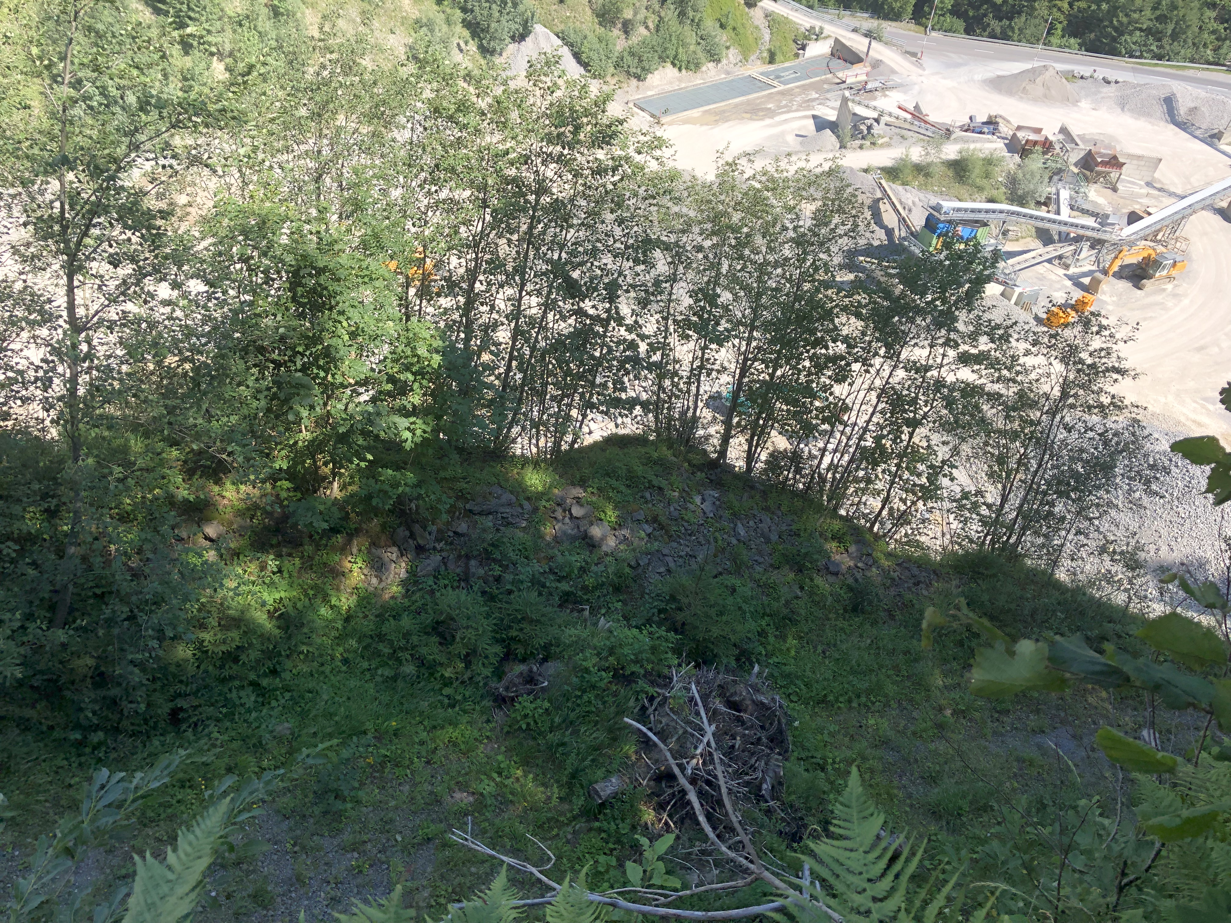 ungefähre Lage der ehemaligen Burg Starkenstein